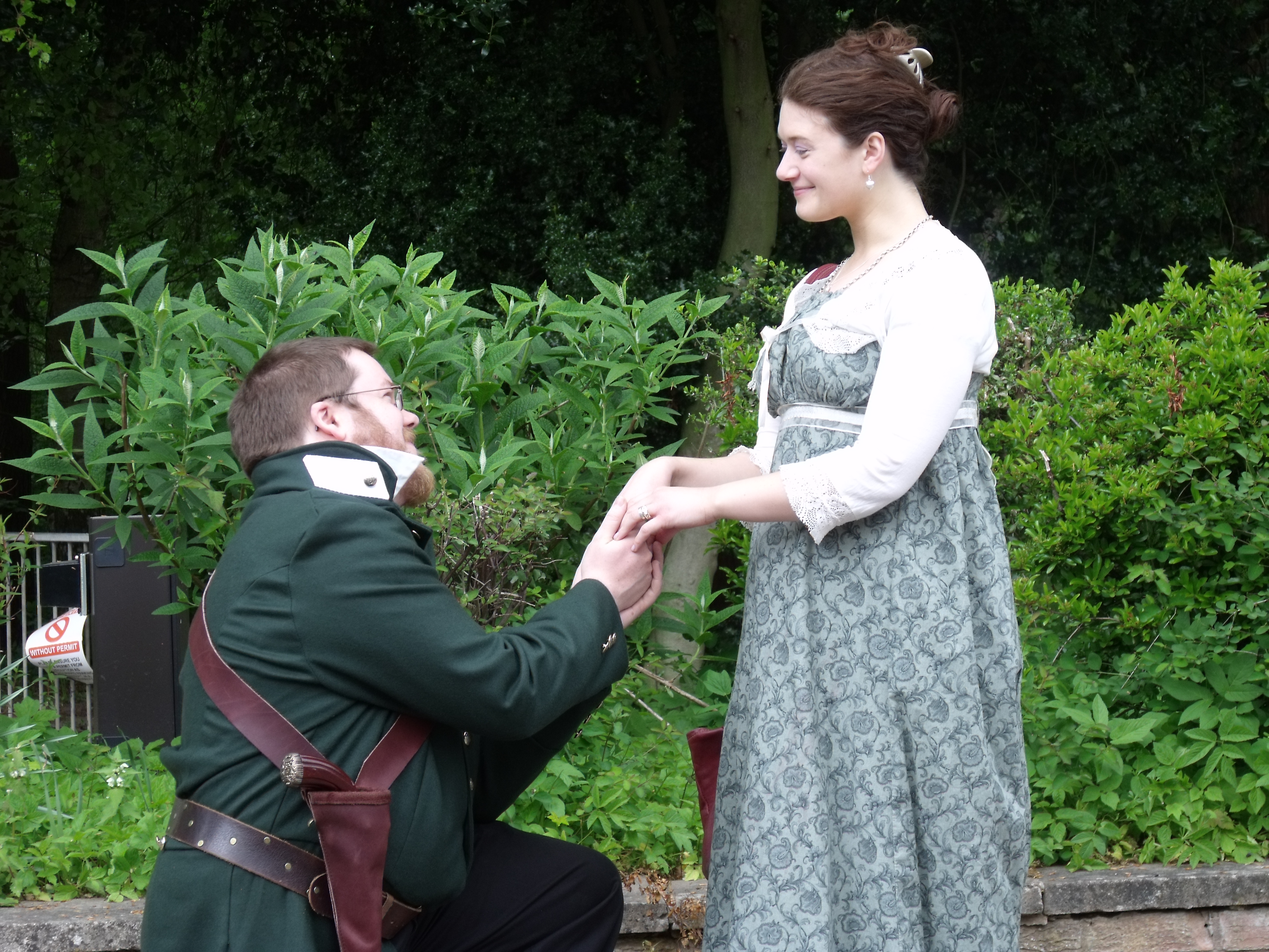 Espousals & Expeditions, the second Masquerades & Massacres event.